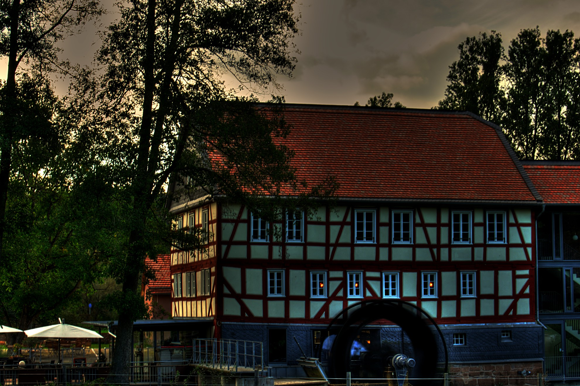 Walkemühle in Frankenberg (Eder), ehemalige Walkmühle (HDR Aufnahme)